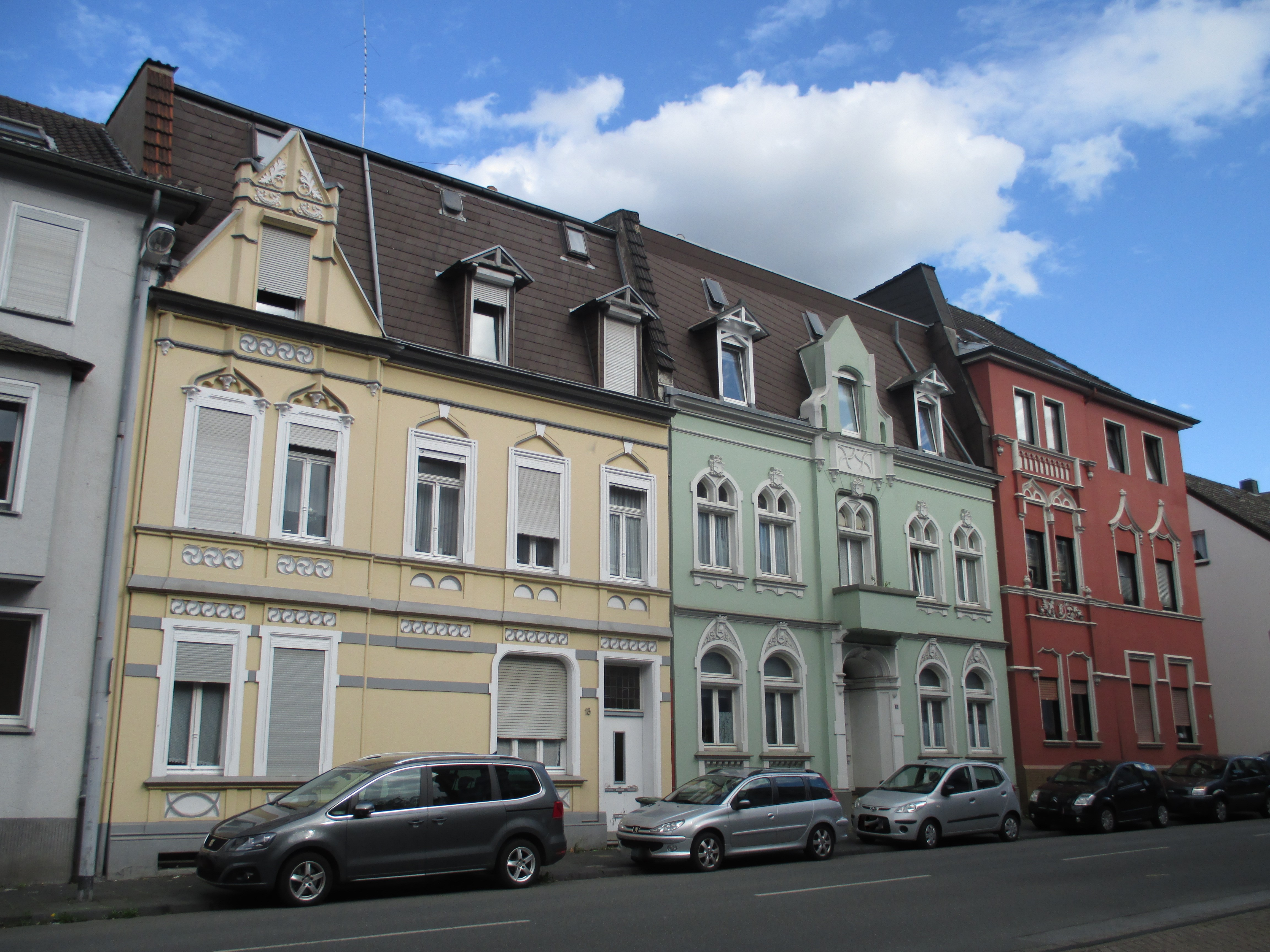 Denkmalgeschützt sind davon die Gebäude 16 und 18 mit ihrer Fassadengestaltung um 1900.This is a photograph of an architectural monument., no. 362